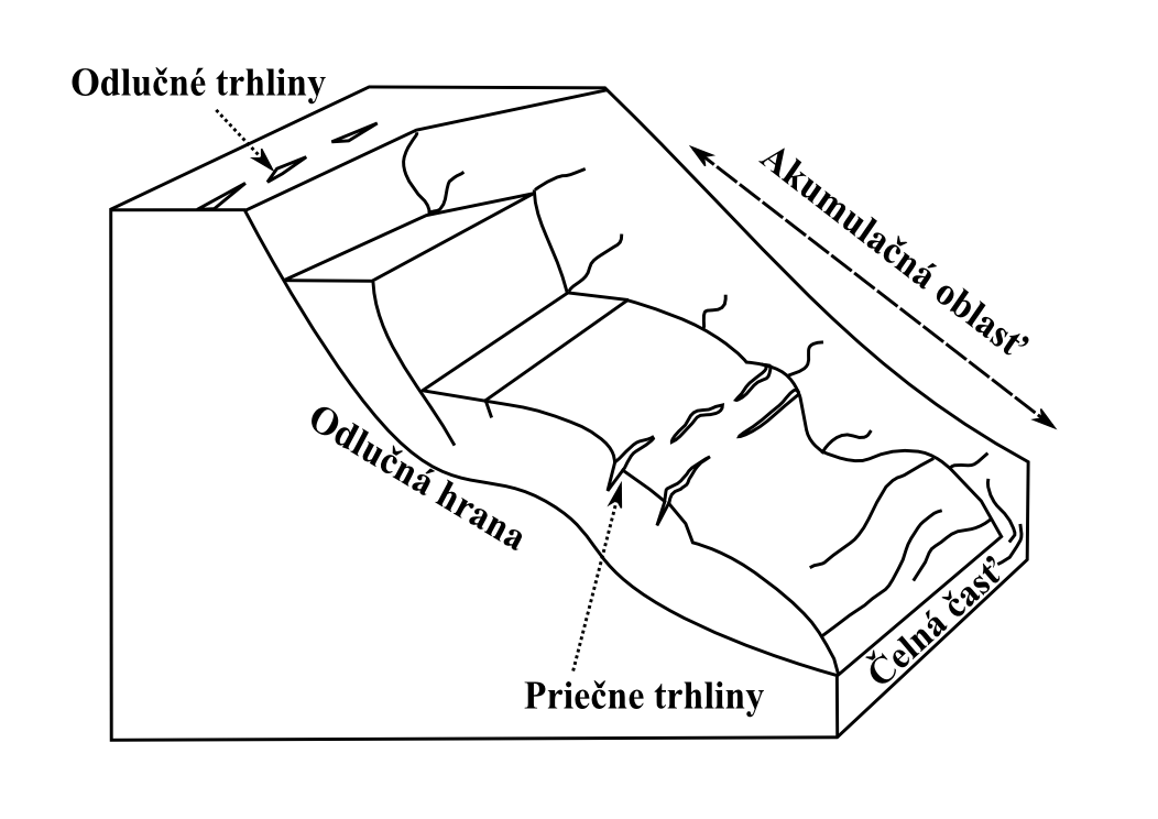 Časti zosuvu